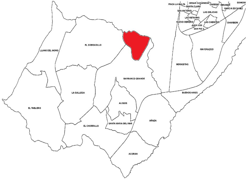 Localización del barrio de Tincer dentro del distrito Suroeste